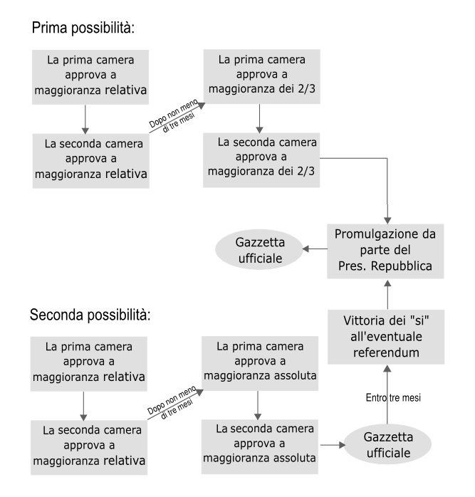 Schema del procedimento per le leggi costituzionali secondo l'ordinamento italiano.